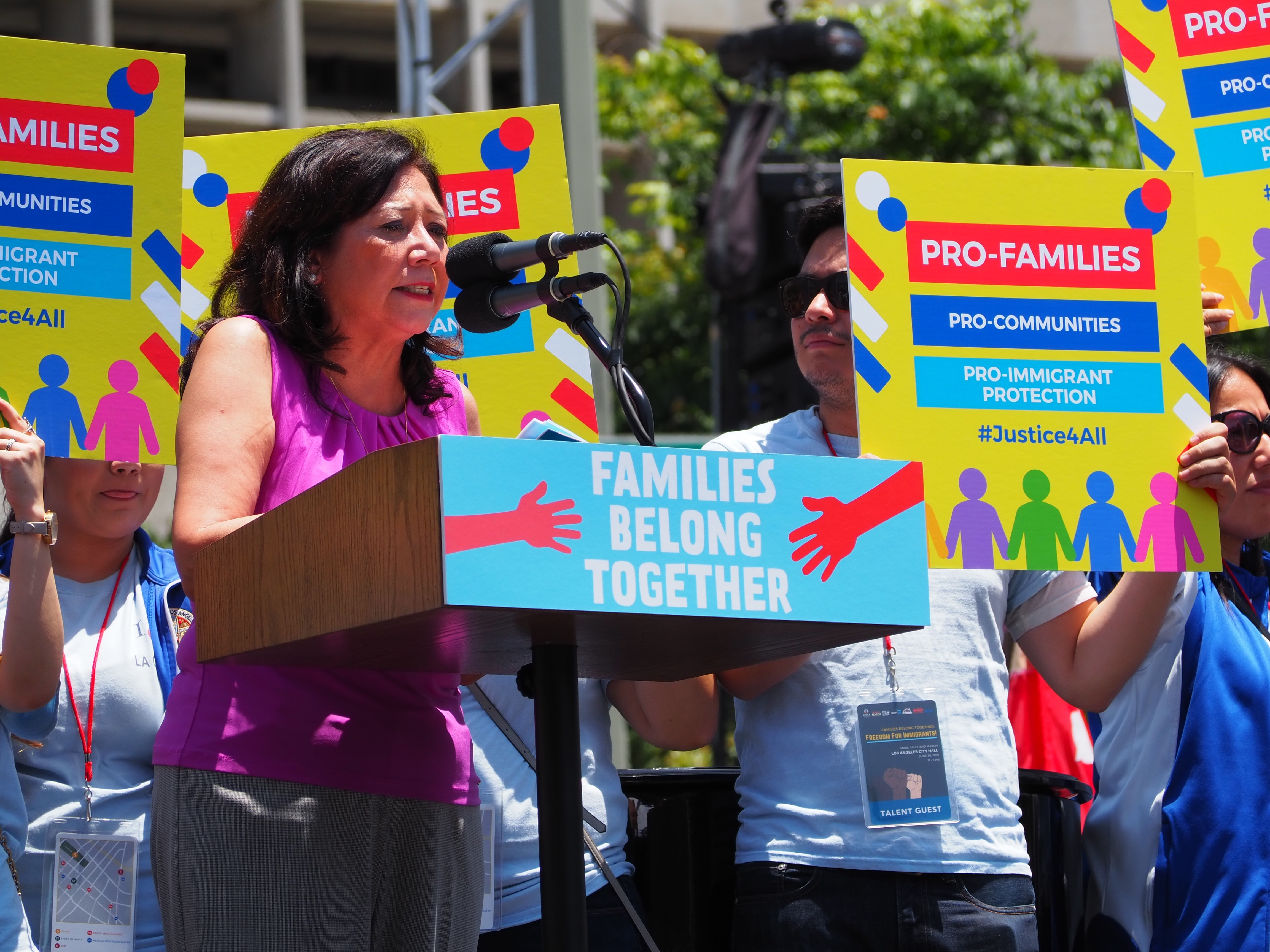 More than 50,000 protesters gathered at Grand Park in downtown L.A. to protest President Trump's "zero tolerance" immigration policy that resulted in 2,300 children being separated from their families after they illegally crossed the border into the U.S.